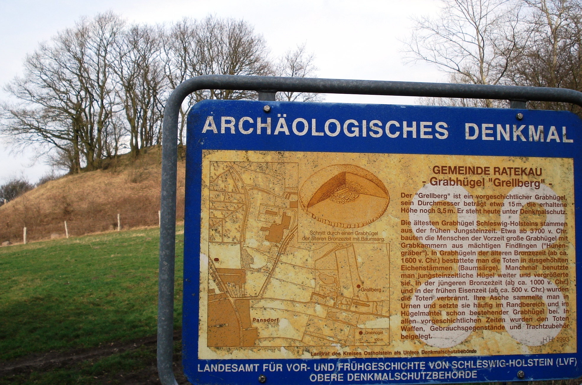 Tafel am "Grellberg" in Ratekau